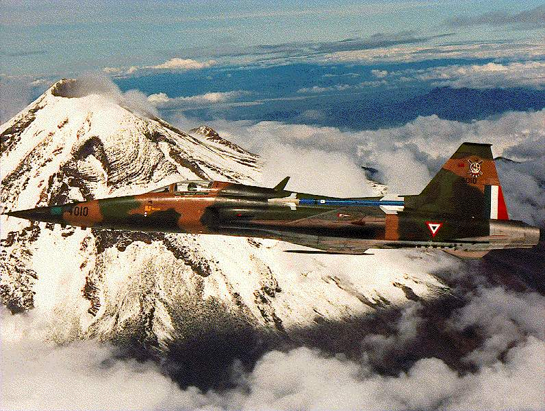 F-5 de la Fuerza Aerea Mexicana sobrevolando el volcan Popocatepetl.